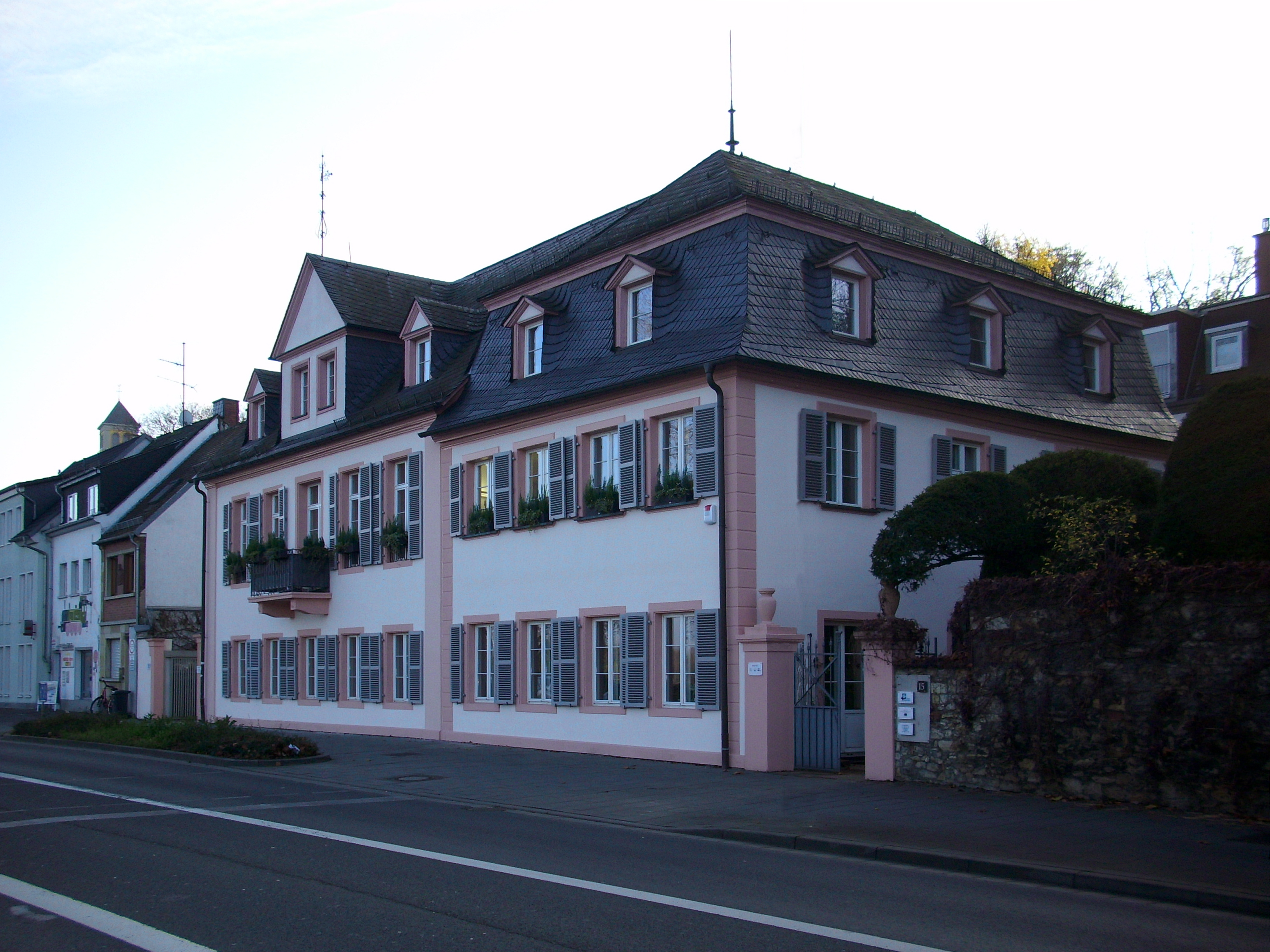 Bauliche Gesamtanlage aus zwei rechtwinklig einander zugeordneten zweigeschossigen Wohnhäusern; spätbarocker Mansardwalmdachbau mit Fachwerk-Obergeschoss, um 1759/60; klassizistischer Putzbau, um 1830; straßenbildprägend